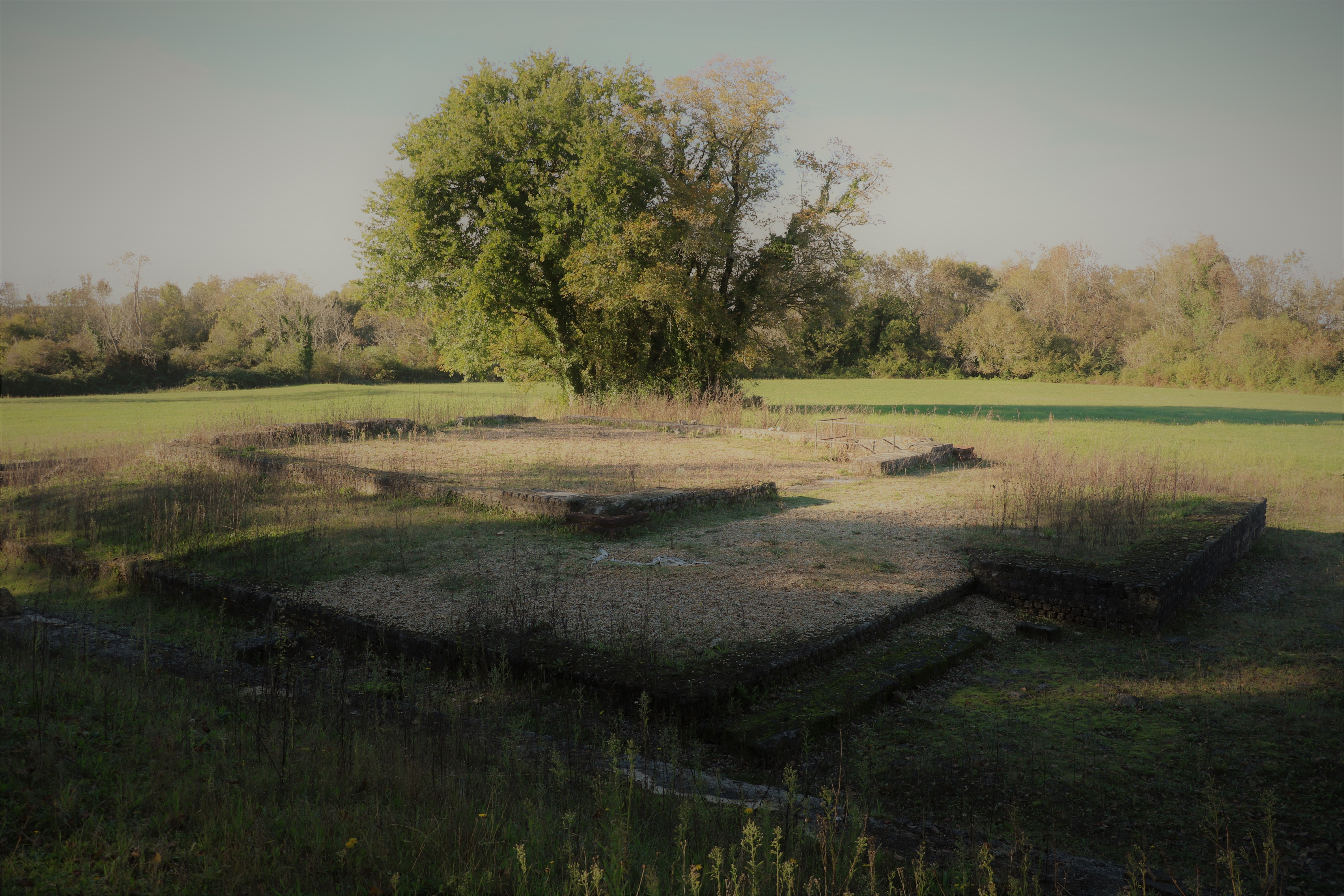 Le temple de tradition celtique, ou fanum, fut construit entre 60 et 80 de notre ère. Il aurait été détruit par un incendie, peut-être au début du IIIe siècle. Des temples semblables n'ont été trouvés jusqu'ici que dans quelques grands centres de la Gaule.